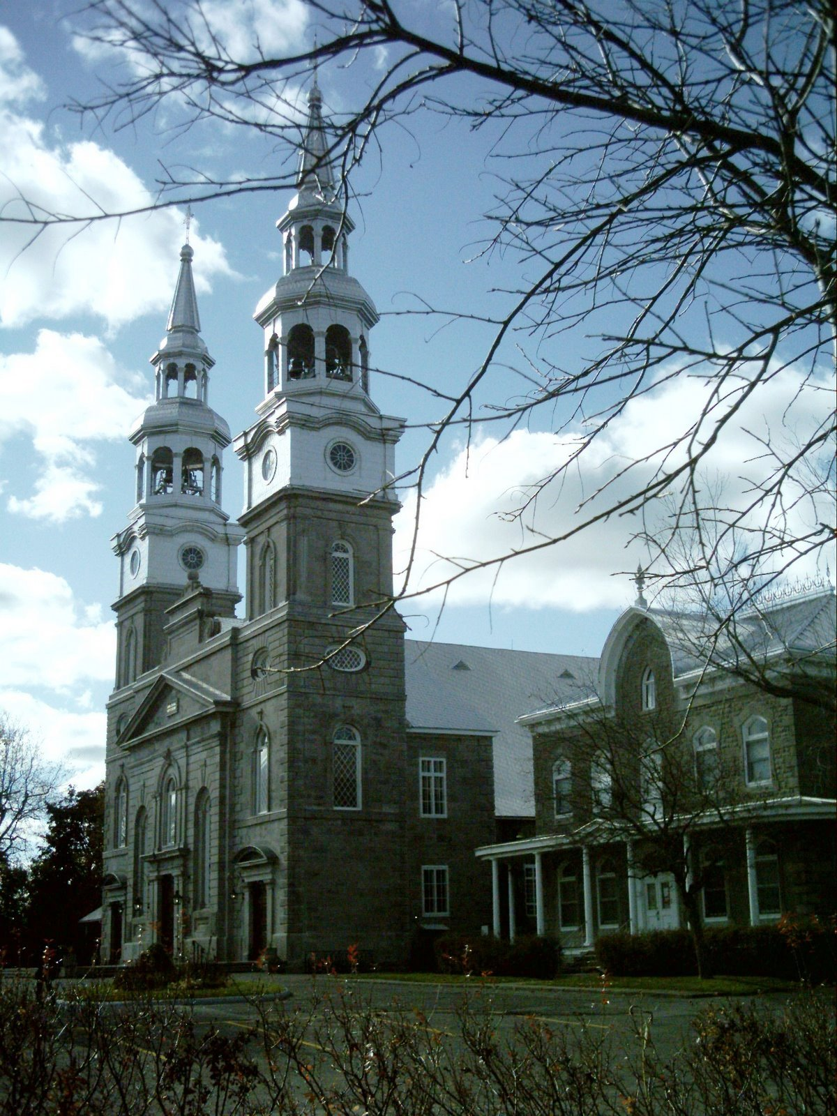 L'église de la Visitation-de-la-Bienheureuse-Vierge-Marie que l'on nomme aussi plus simplement l'église de la Visitation, est la seule église de style traditionnel québécois sur l'île de Montréal. Construite en pierres des champs vers 1750, elle est la plus ancienne église de Montréal. Elle est située au 1847, boulevard Gouin est, au Sault-au-Récollet dans l'arrondissement Ahuntsic-Cartierville, à Montréal.